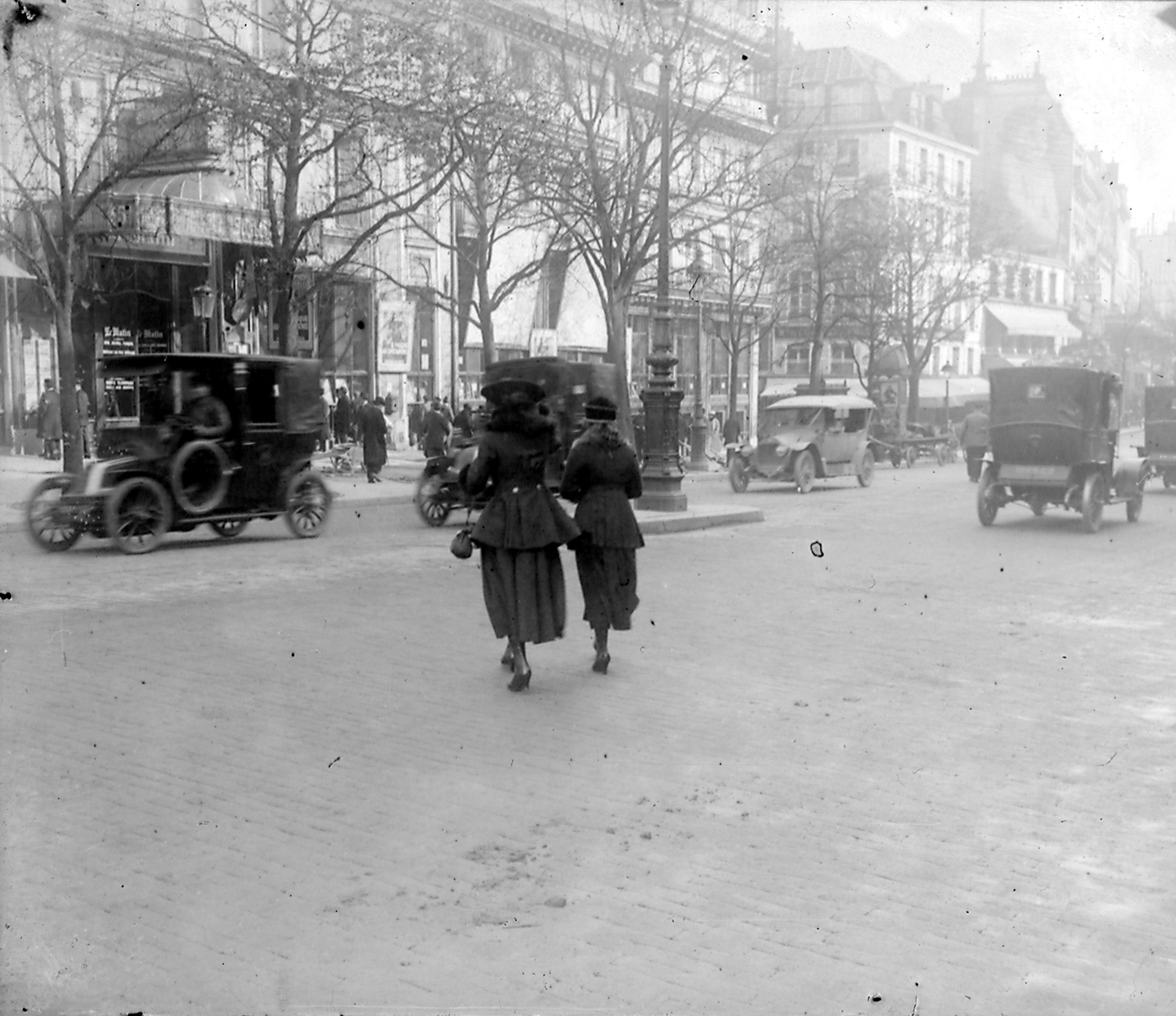 Photo prise par mon grand-père Maurice Terrien pendant la guerre de 14-18. - Deux dames élégantes en costume de ville traversant le boulevard en direction de l'immeuble du journal quotidien Le Matin, Boulevard Poissonnière, IIe arrondissement, Paris, France.